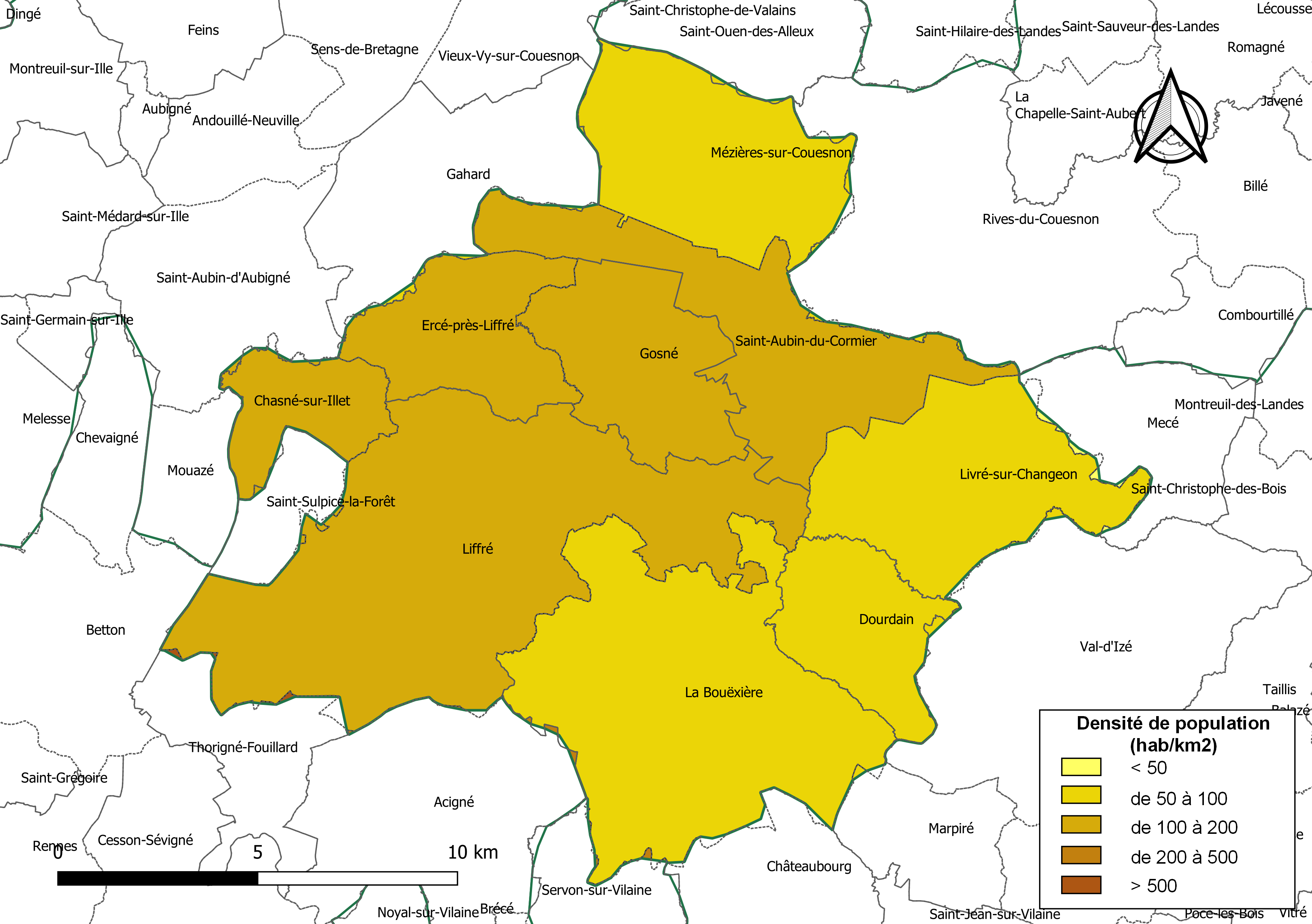 Carte des densités de population (millésimée 2016) des communes de l'intercommunalité Liffré-Cormier Communauté, département d'Ille-et-Vilaine, France. Composition au 1er janvier 2019.